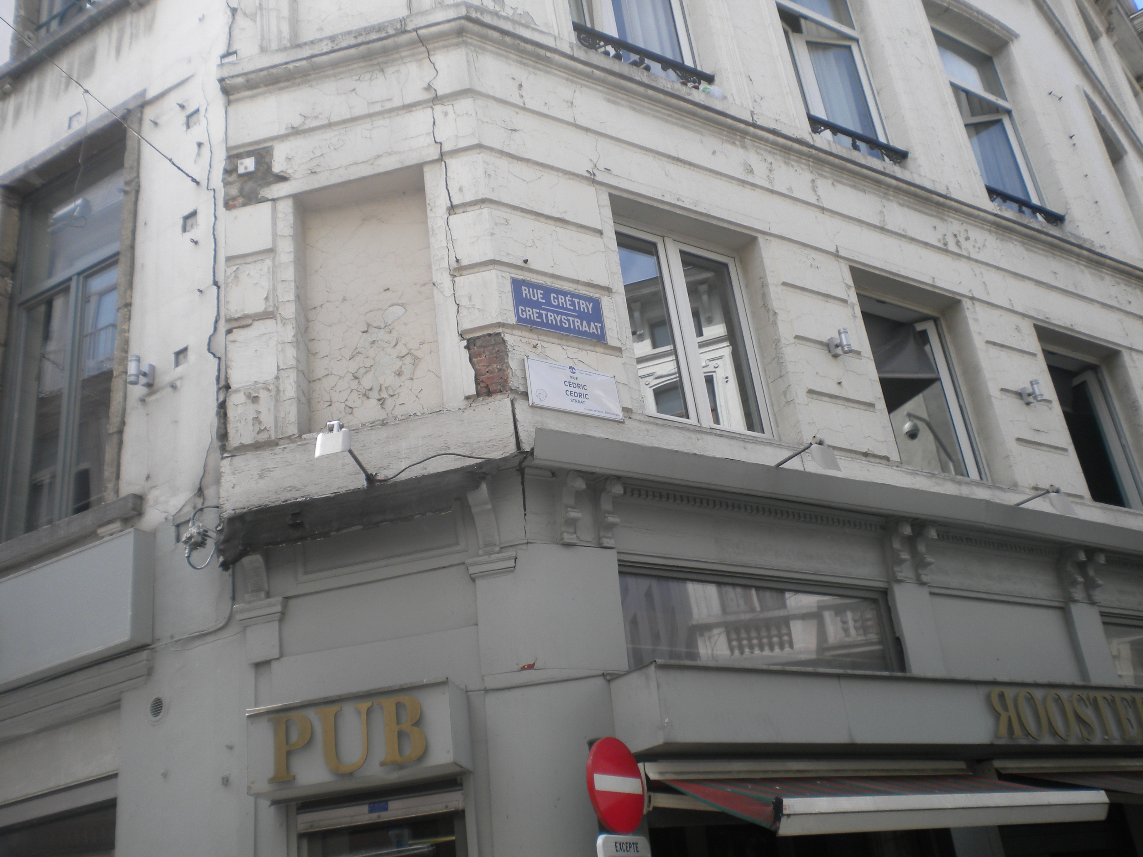 Plaque de la rue Cédric à Bruxelles.